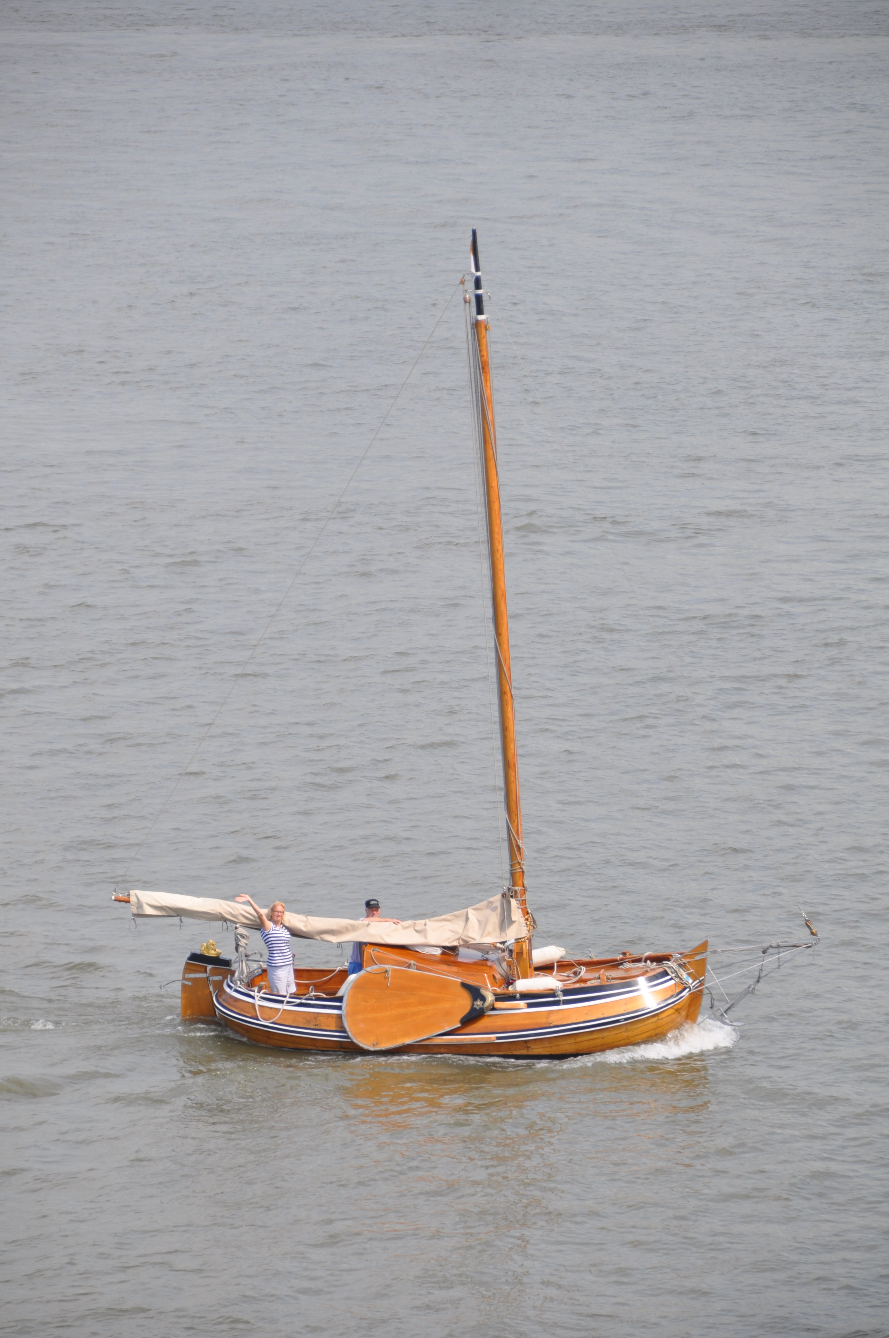 Een boeier opvarend onder de Merwedebrug bij Gorinchem